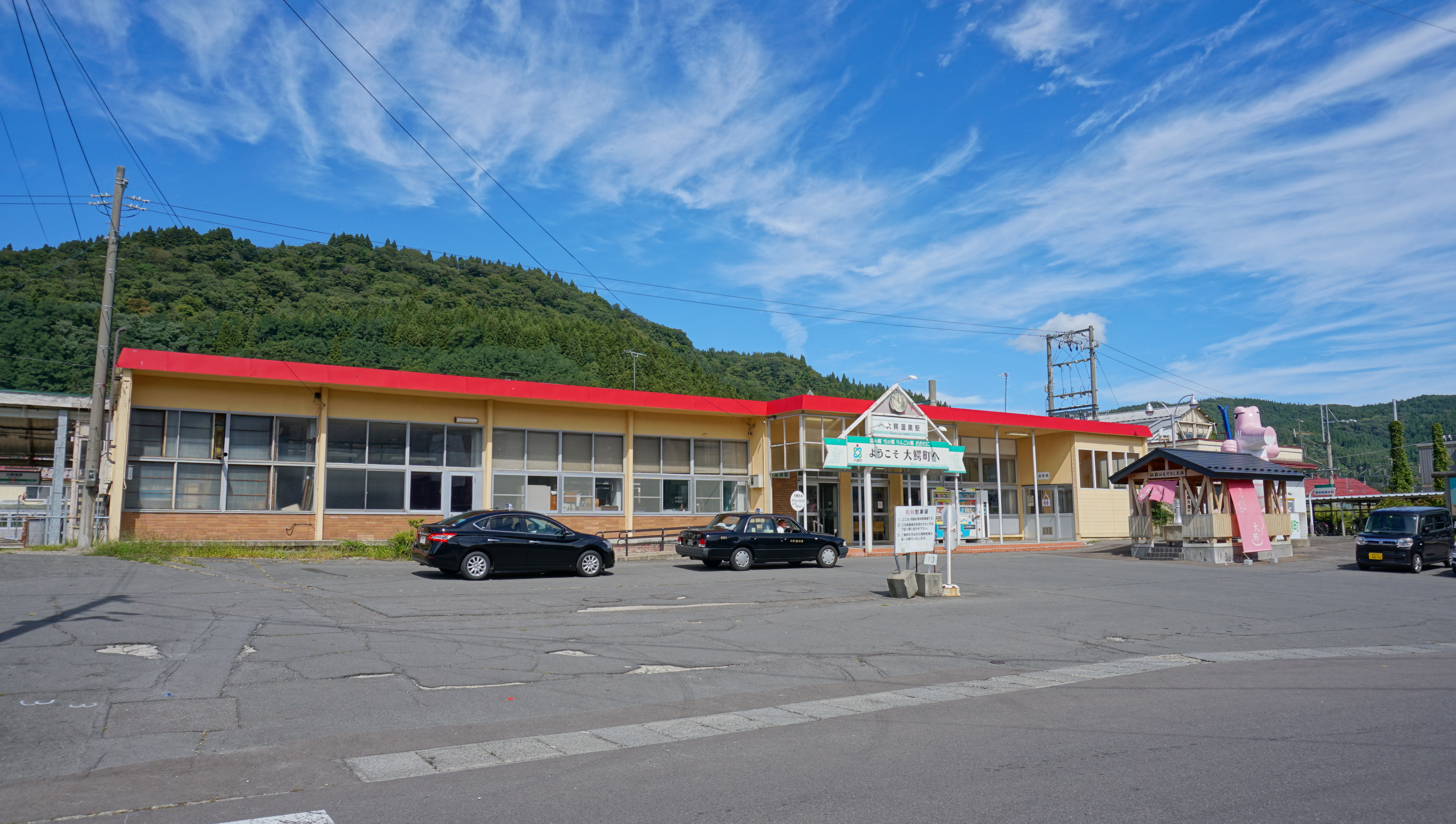 奥羽本線 大鰐温泉駅